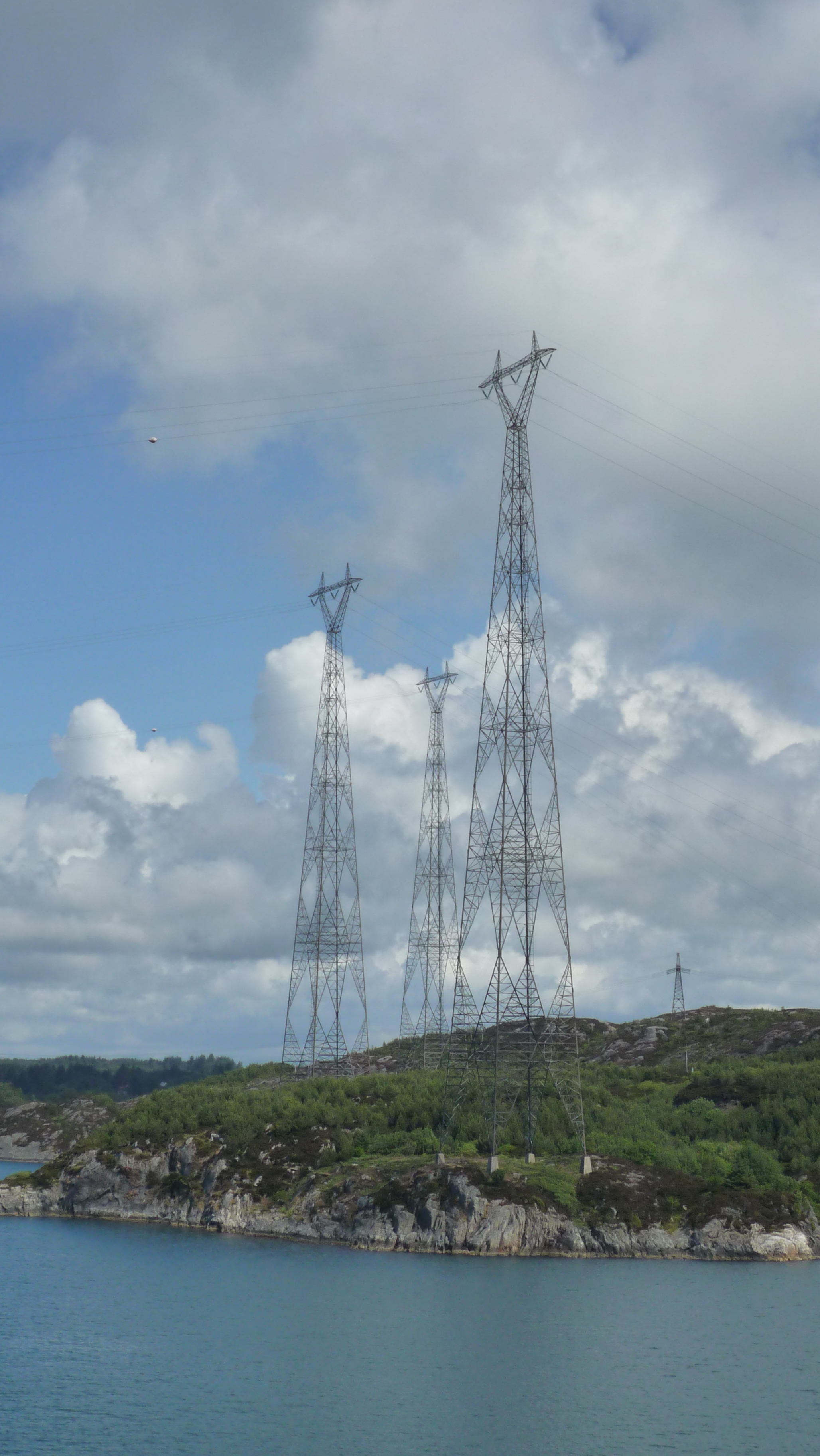 Høgspentmaster på austsida av Karmsundet, på øya Fosen. Fører kraft til Hydro Karmøy